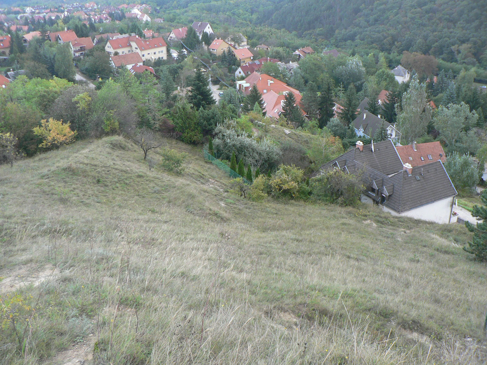 Kilátás a Kakukkhegyről